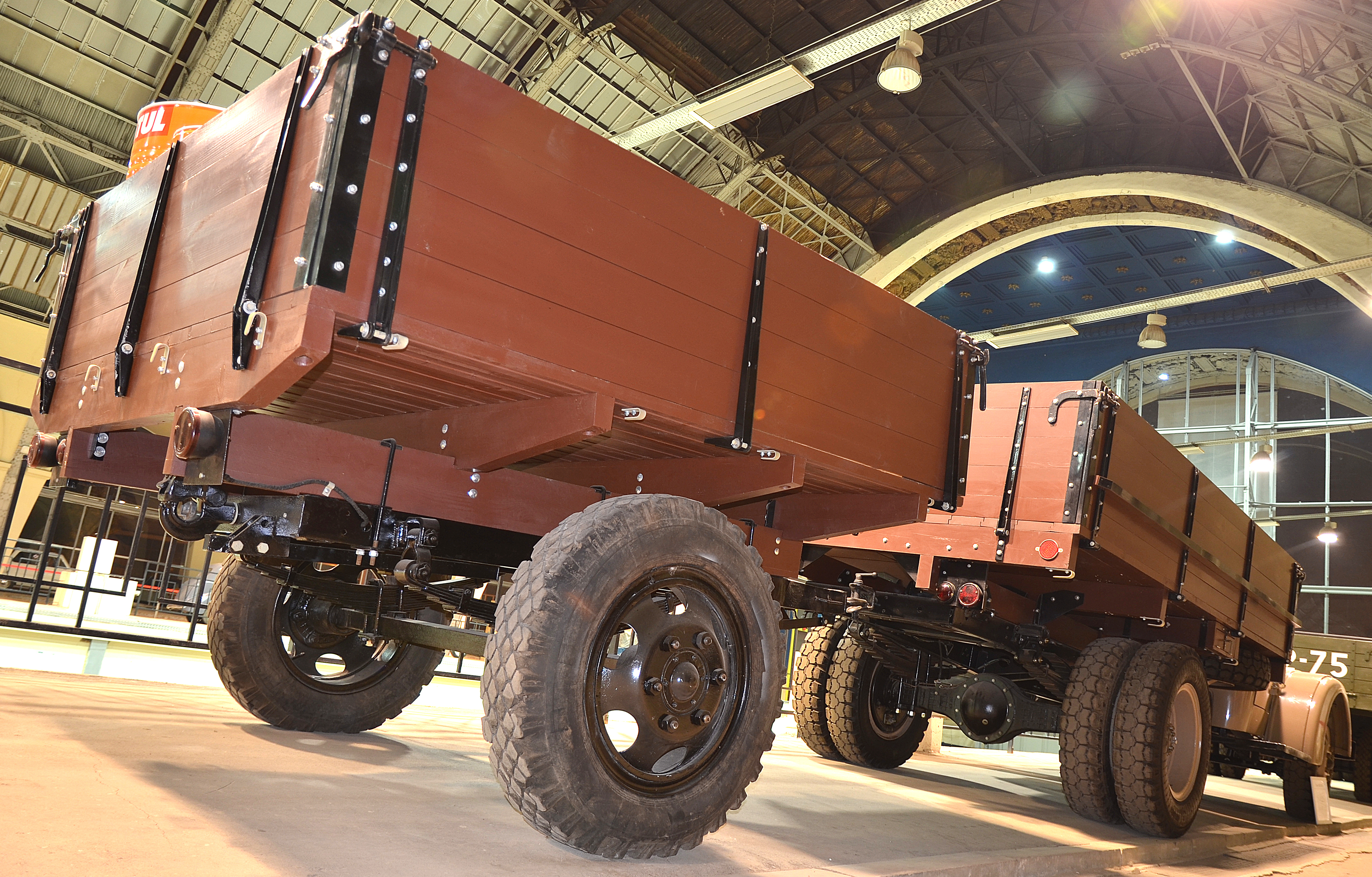 Можно увидеть здесь : You can see here